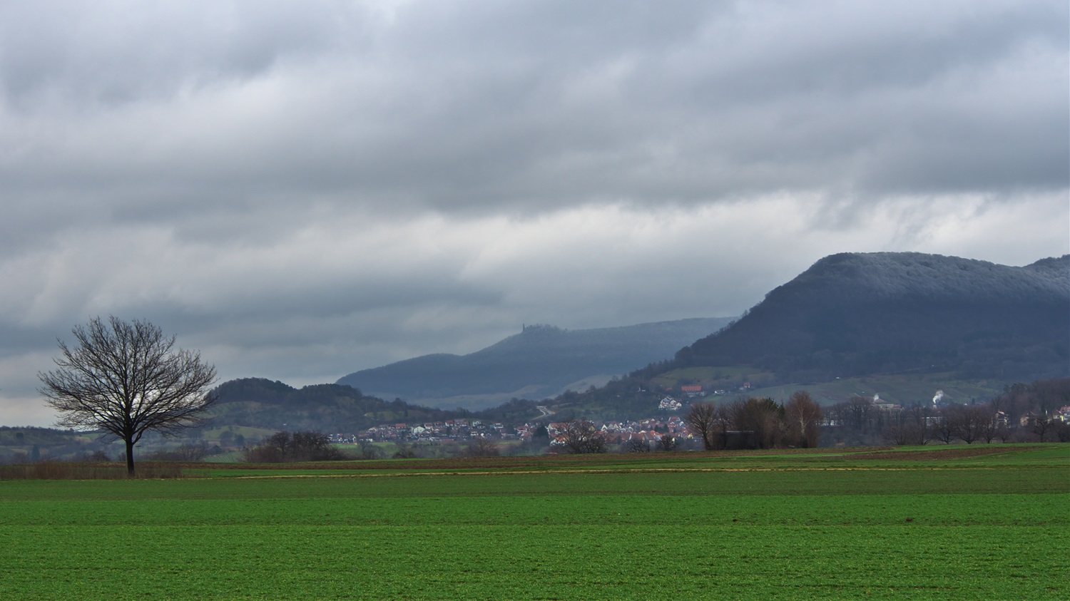 Blick bei Neuffen (Baden-Württemberg) auf den Albtrauf, im Hintergrund die Burg Teck – welches Schutzgebiet ist da zu sehen?